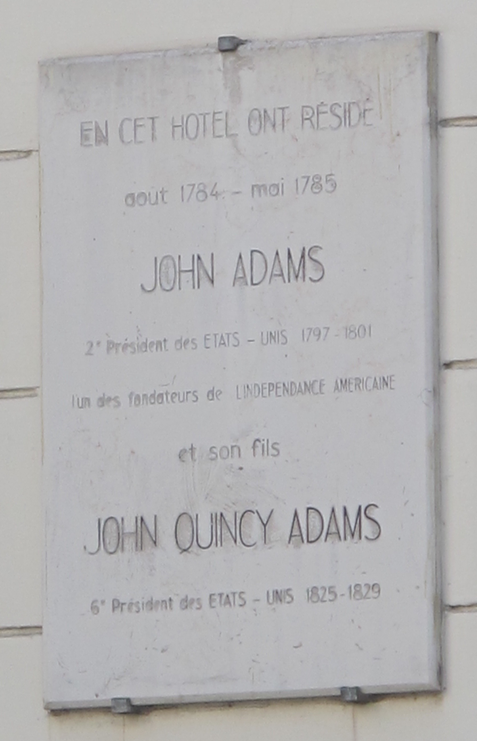 Plaque sur l'hôtel de Verrières, situé au 45-47 rue d'Auteuil (Paris, 16e). Elle indique qu'entre août 1784 et mai 1785, les futurs présidents des États-Unis John Adams (père) et John Quincy Adams (fils) ont résidé en ce lieu.